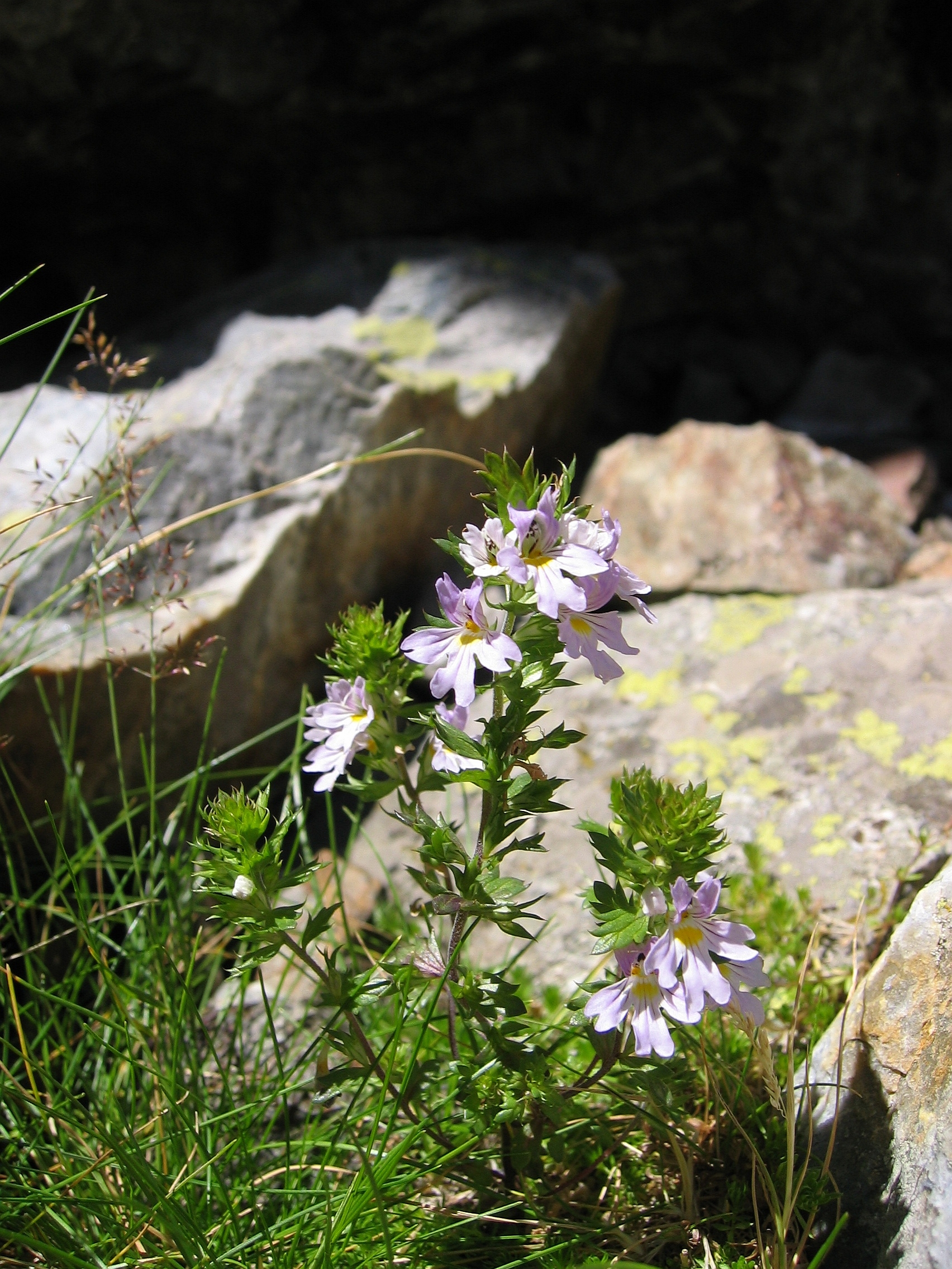 Euphrasia alpina subsp. alpina, Near Refuge de Arremoulie, Pyrenees, France